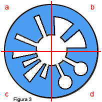 Tipos de oquedades de n magnetrón